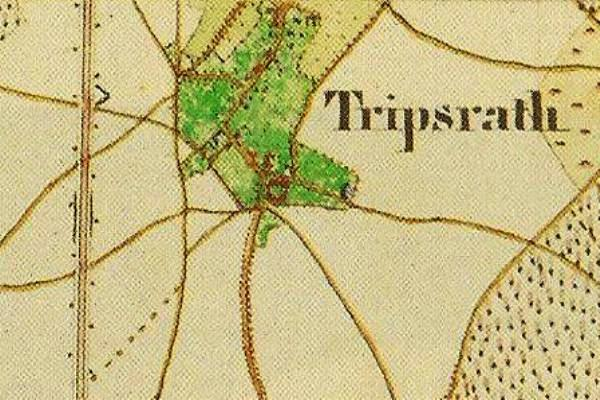 Preußische Kartenaufnahme 1846 - Uraufnahme - (5002 Geilenkirchen)